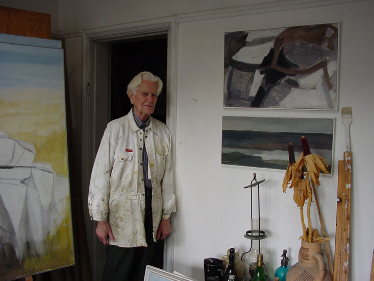 Allan Erwö